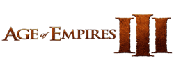 Logo von Age of Empires 3